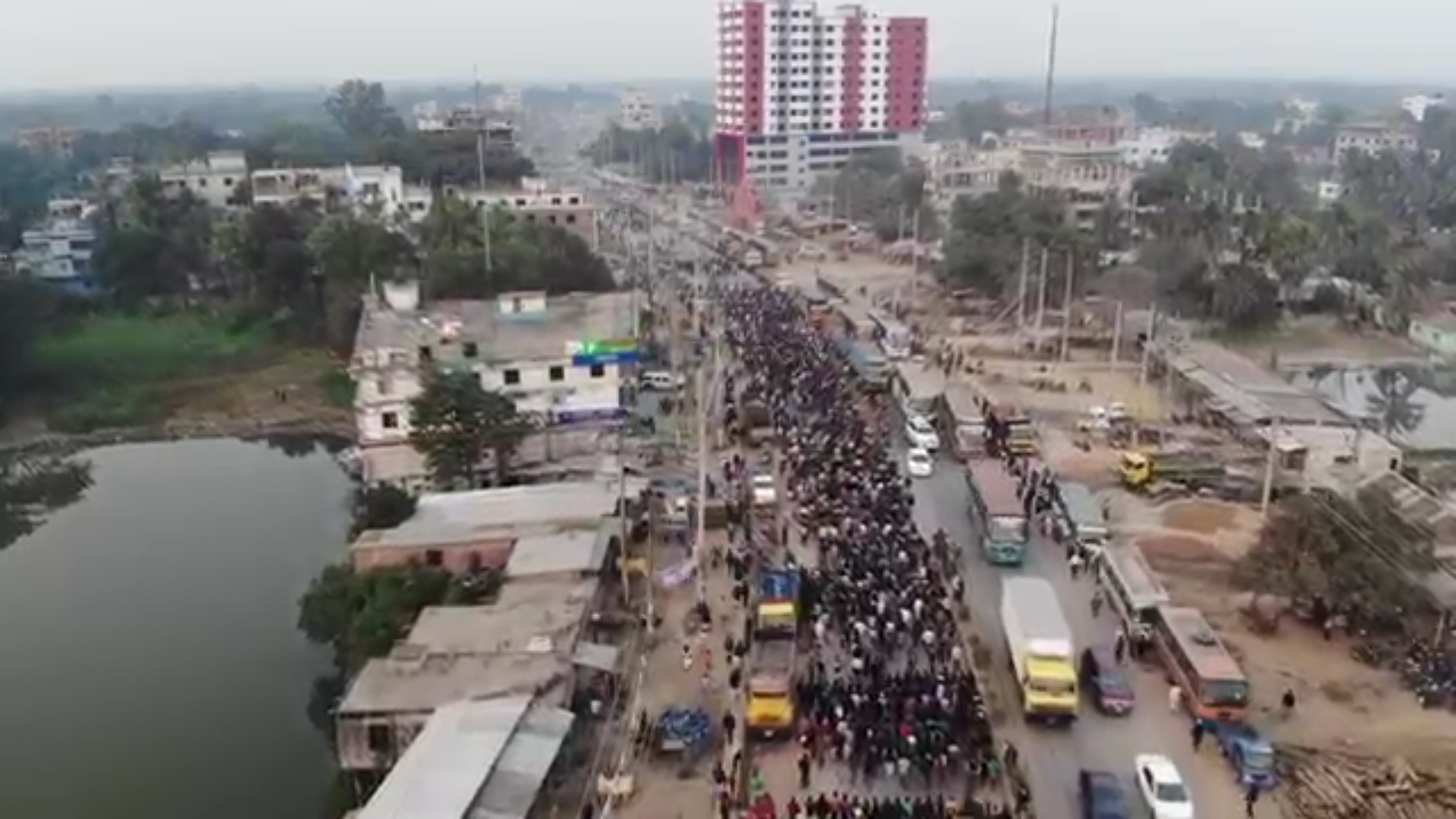 Bhaluka